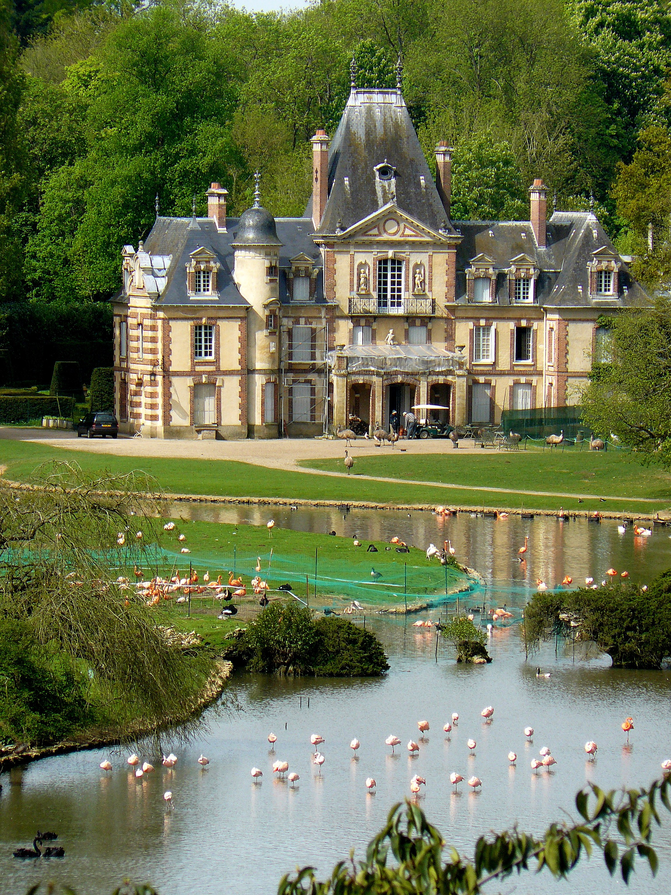 Château de Sauvage (Yvelines, France)